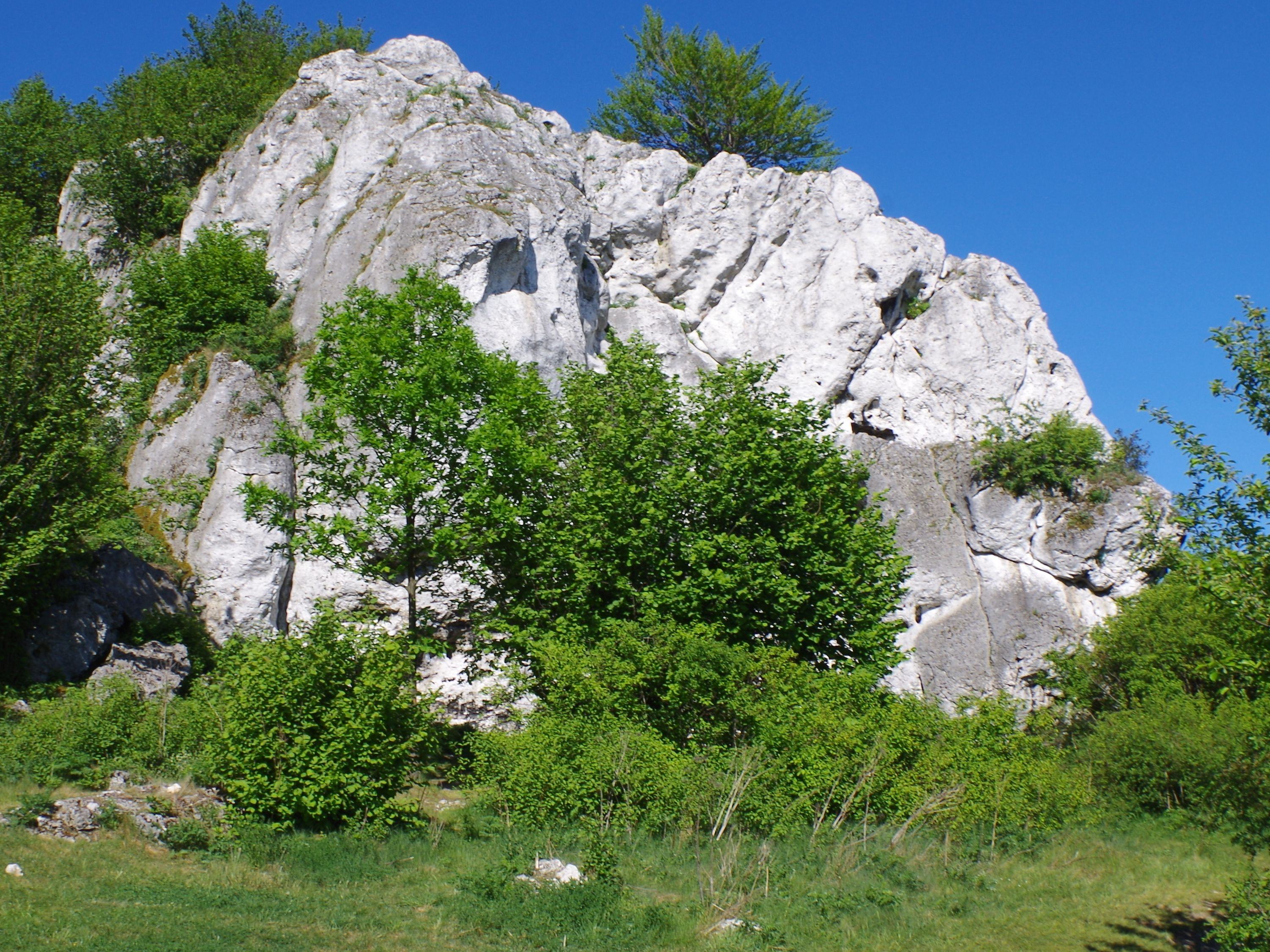 Turnia Kursantów w grupie Skał Rzędkowickich